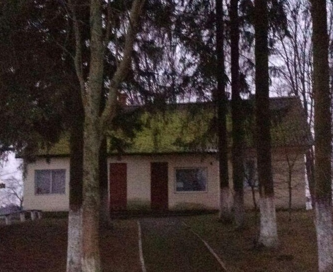 Фельдшерсько-акушерський пункт в селі Озеро (Ківерцівський район).